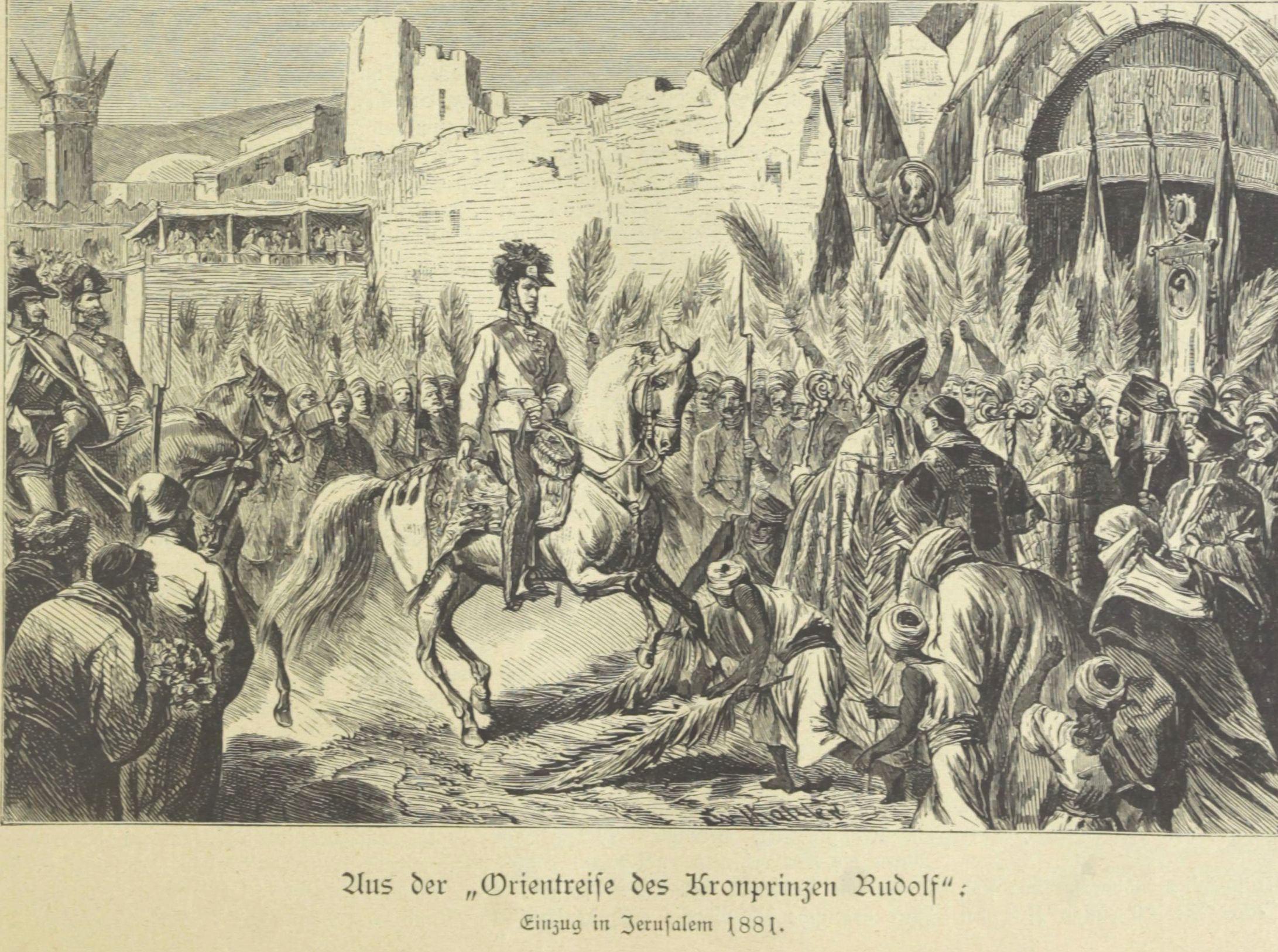 Rudolf és kíséret Jeruzsálemben